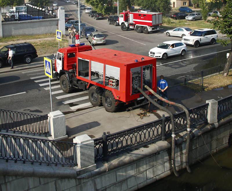 Пожар в Центре им. Грабаря. Пожарная насосная станция